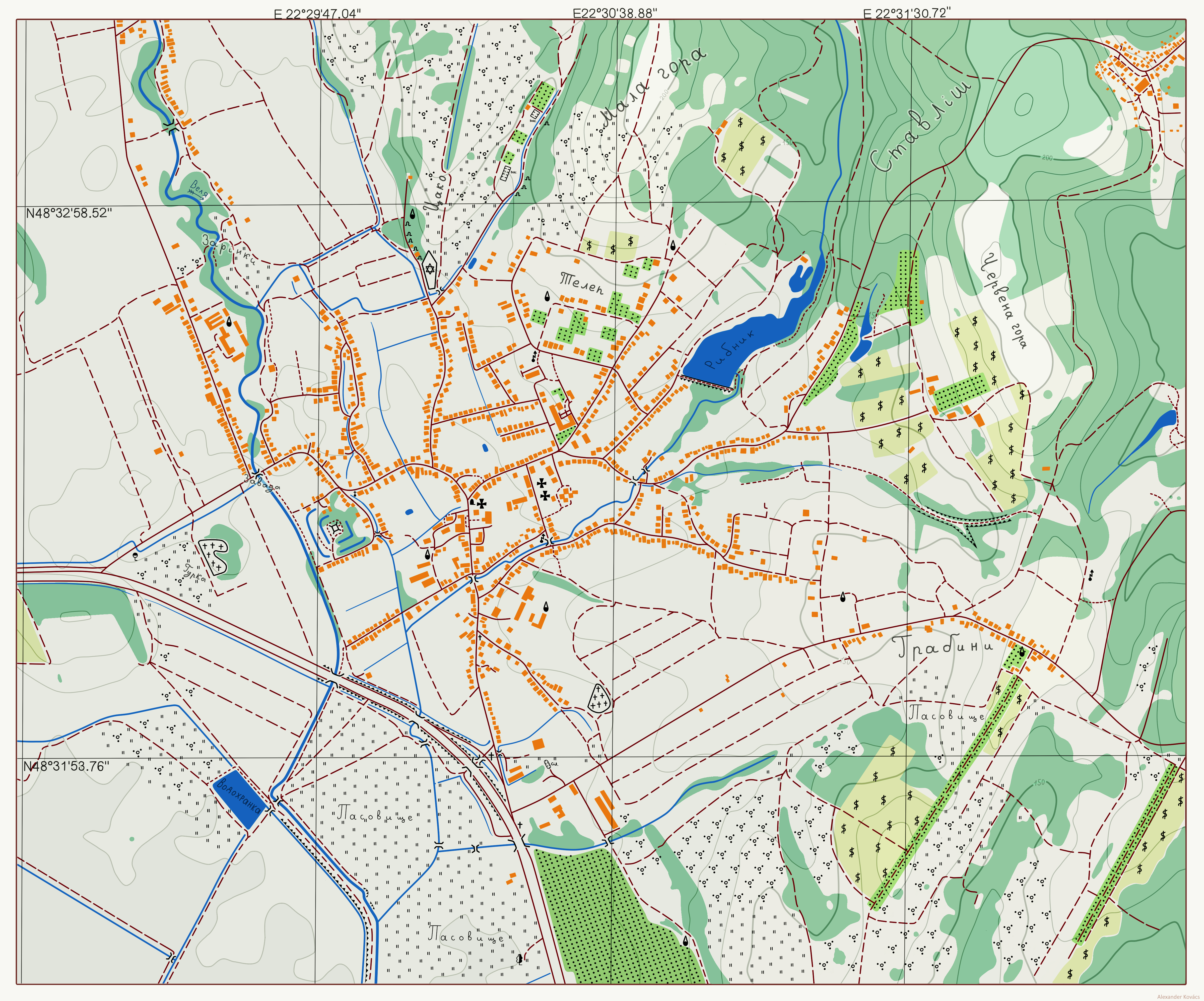 Szerednye topográfiai térkép